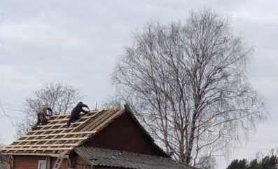 Монтаж обрешётки крыши